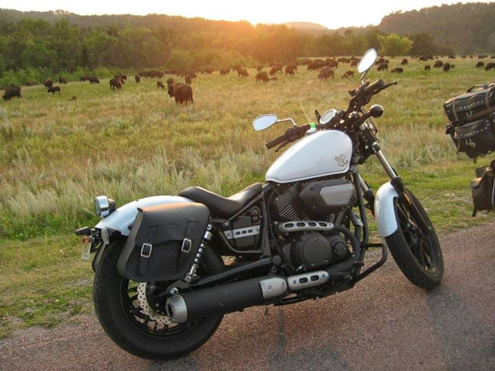 2014 Yamaha Star Bolt